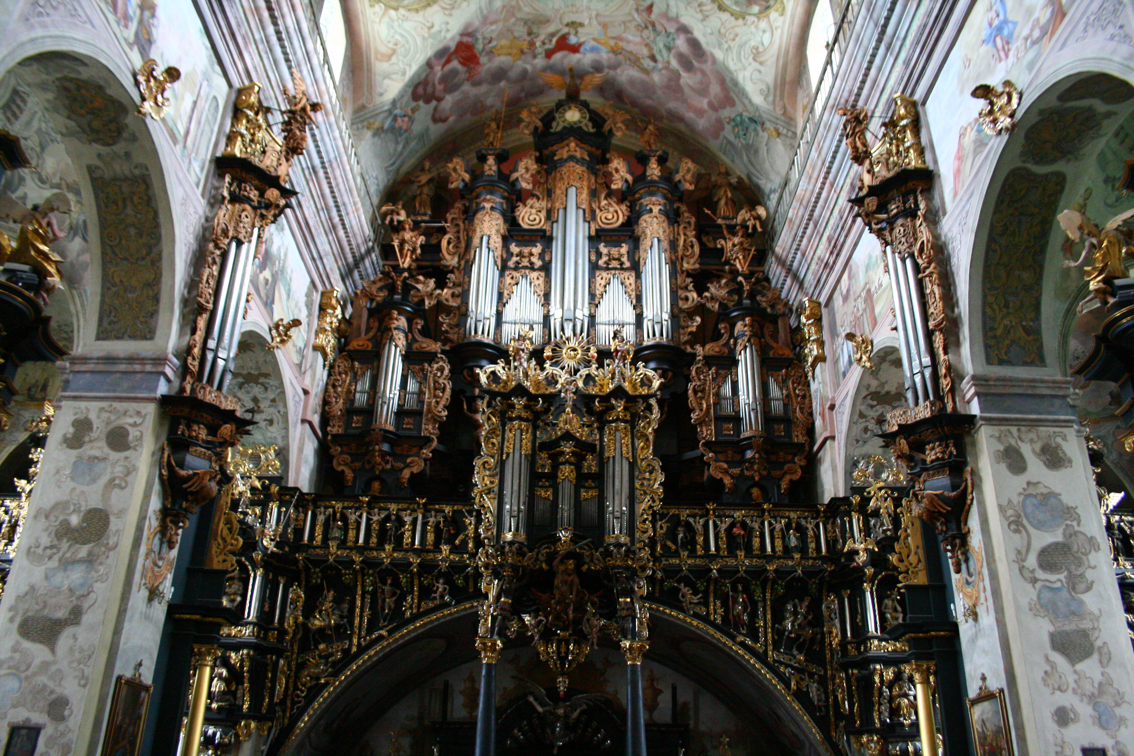 Organy w Bazylice Zwiastowania Najświętszej Maryi Panny w Leżajsku.